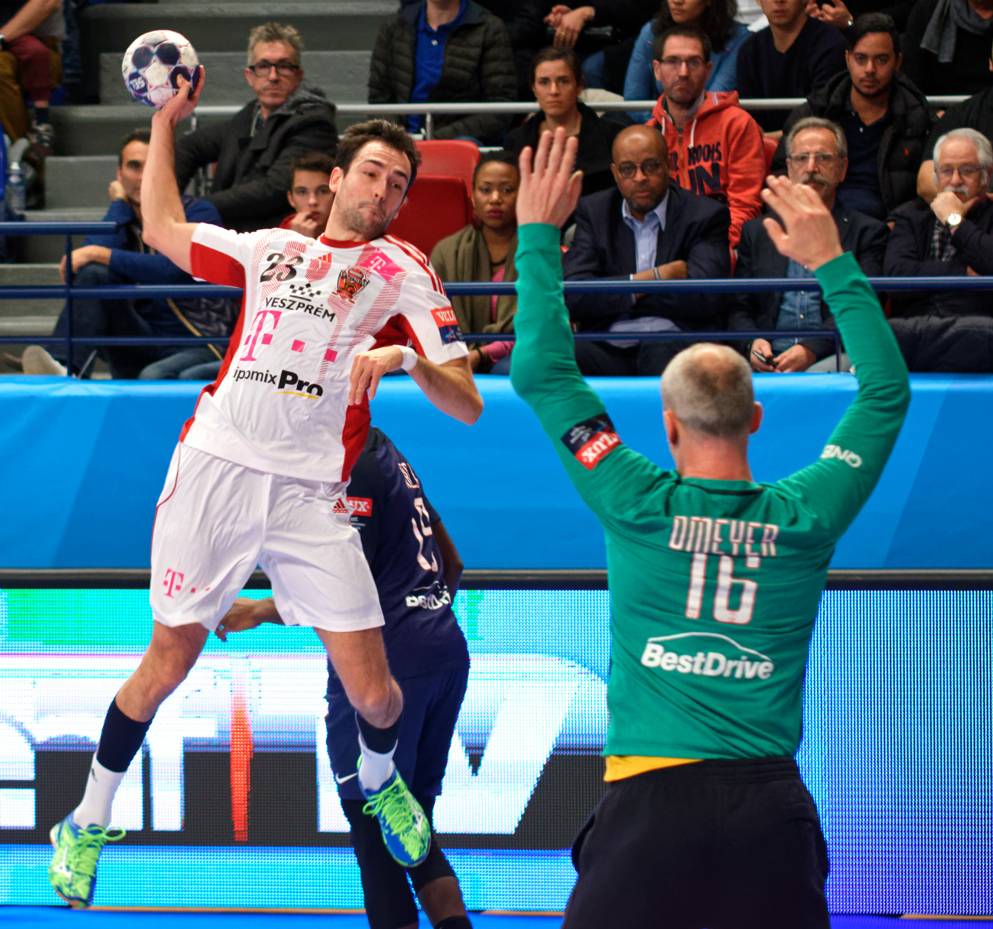 Rencontre de phase de groupe entre le PSG et Veszprem; A Coubertin, le 27 novembre 2016.